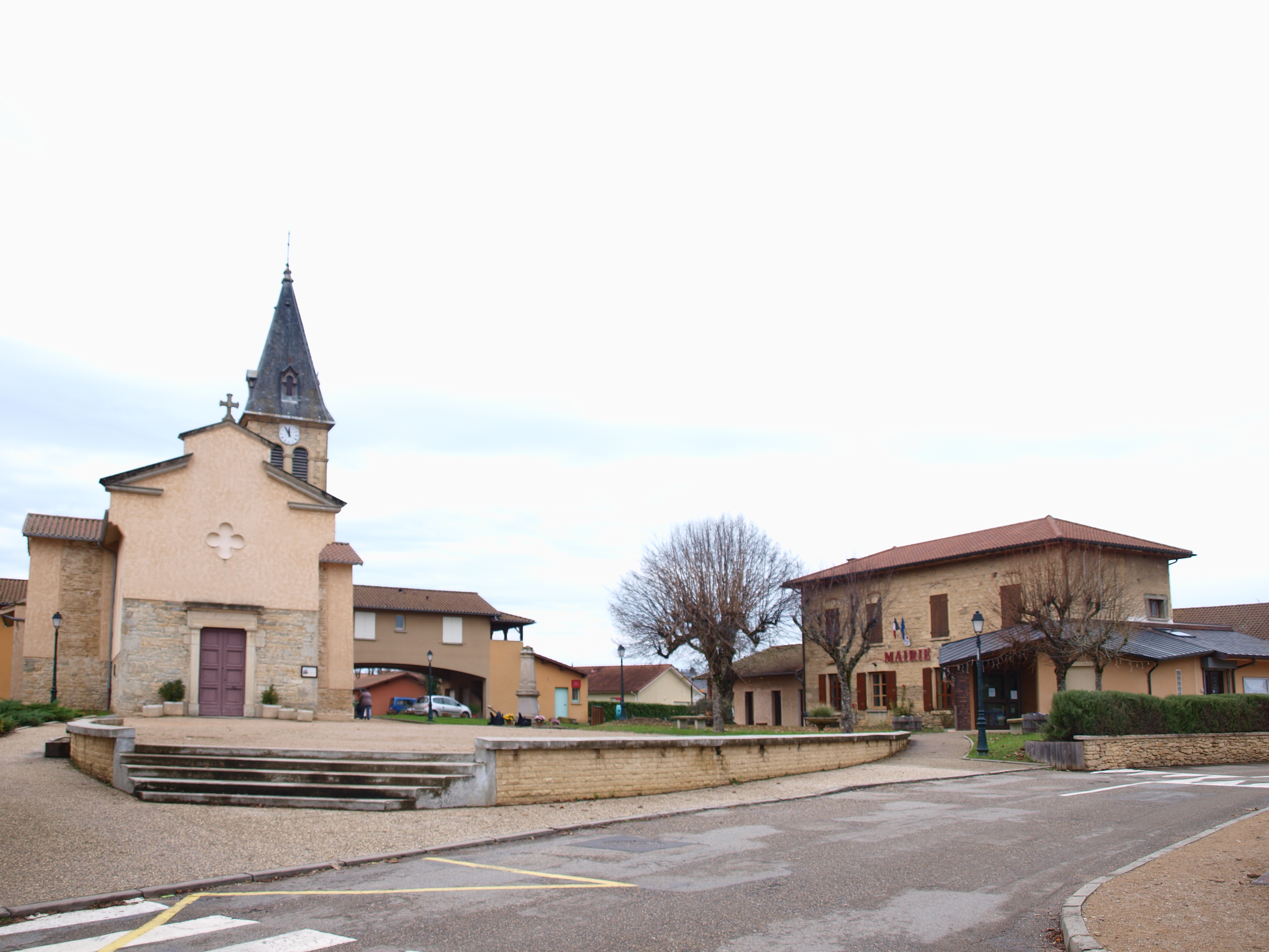 Meyrié (Isére, France)